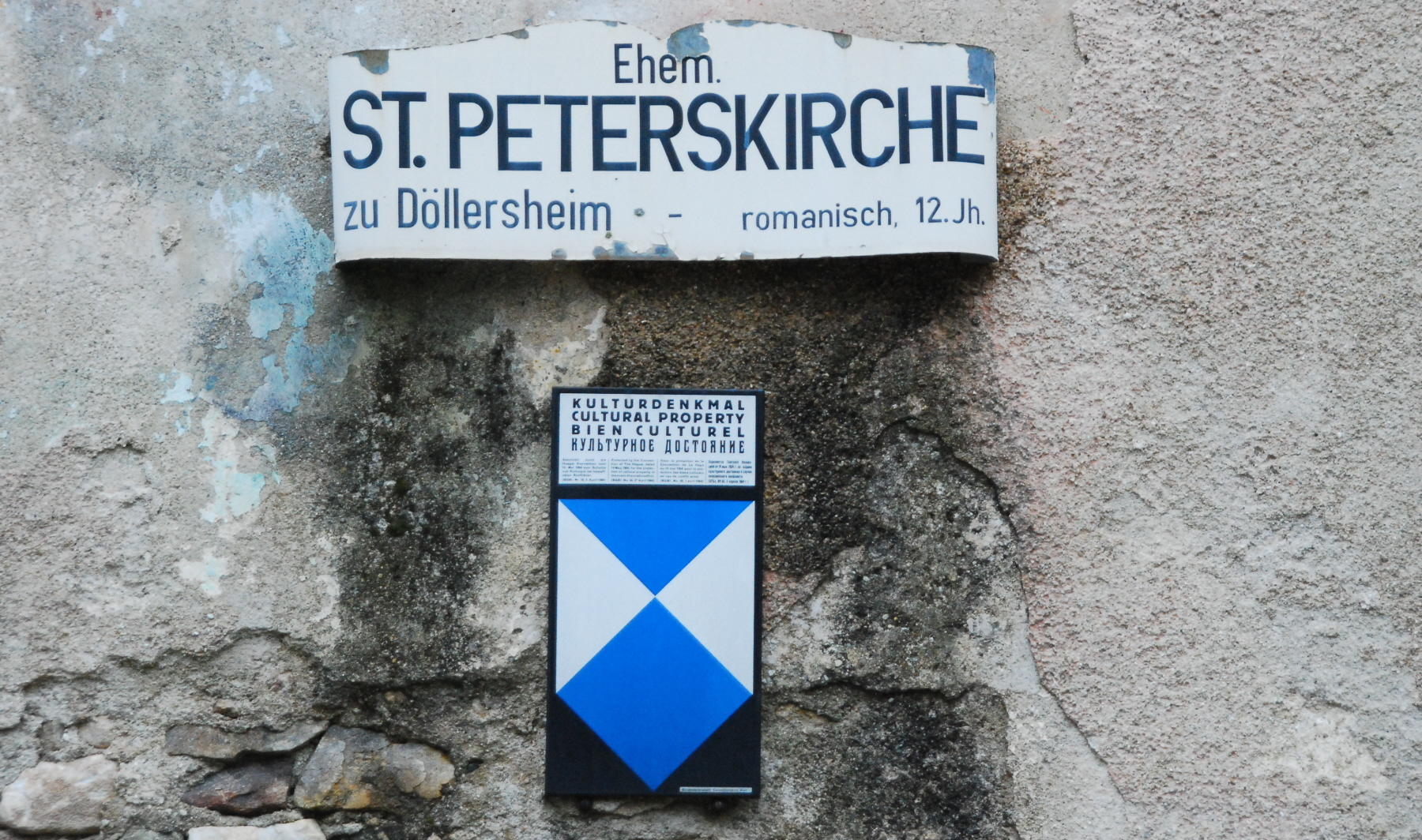 Tafeln an der Kirche von Döllersheim in Niederösterreich